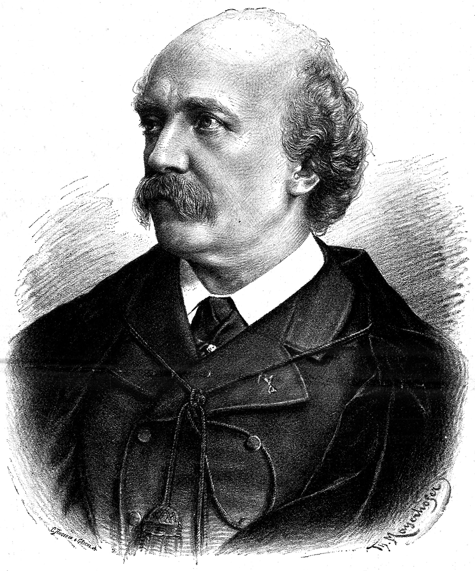 Portret van Paul Alberdingk Thijm. Afkomstig uit de Nieuwe Belgische Illustratie, jaargang 4, nr. 19, p. 145.